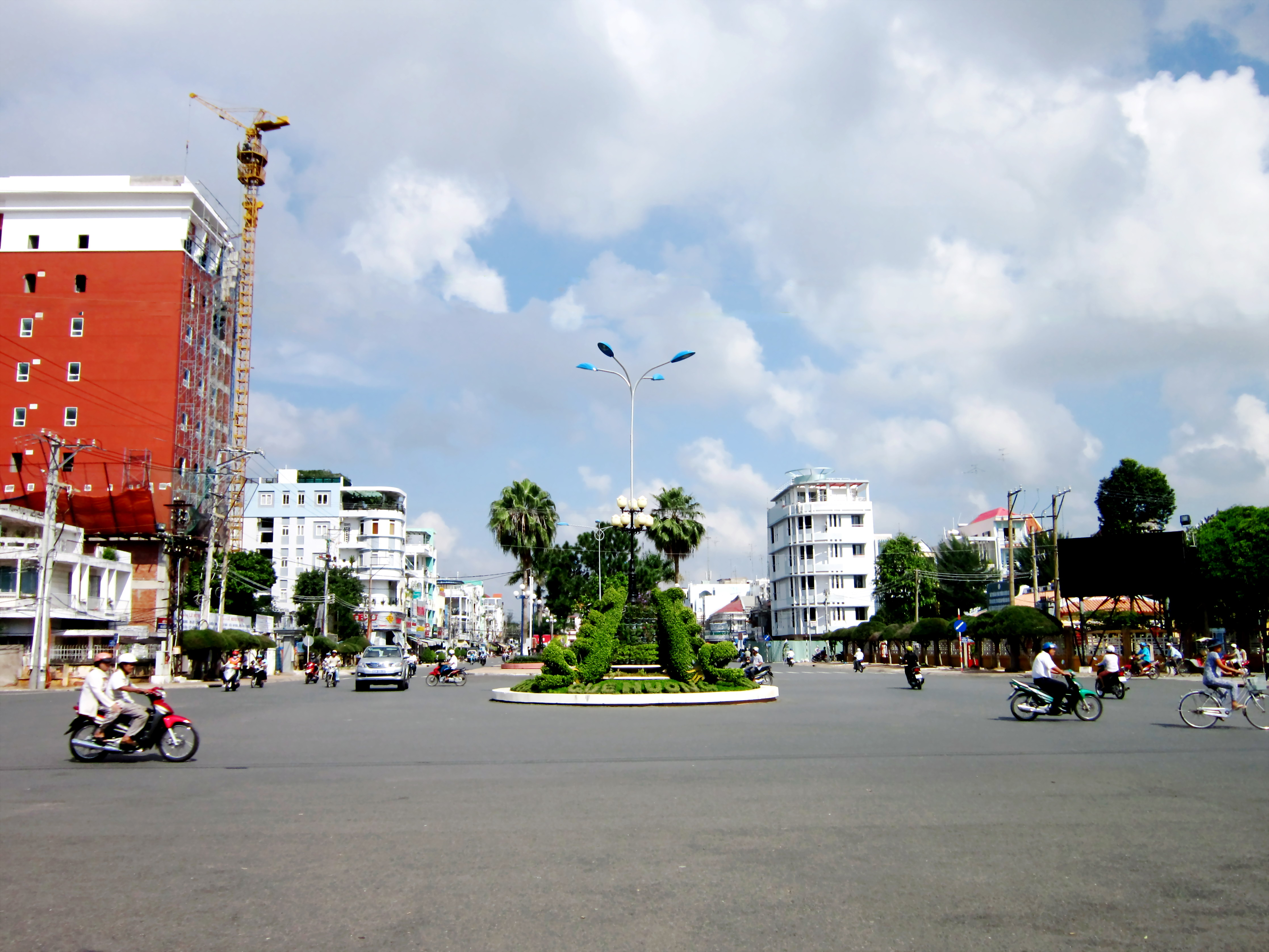 Vòng xoay trung tâm thành phố Long Xuyên, tỉnh An Giang, Việt Nam.